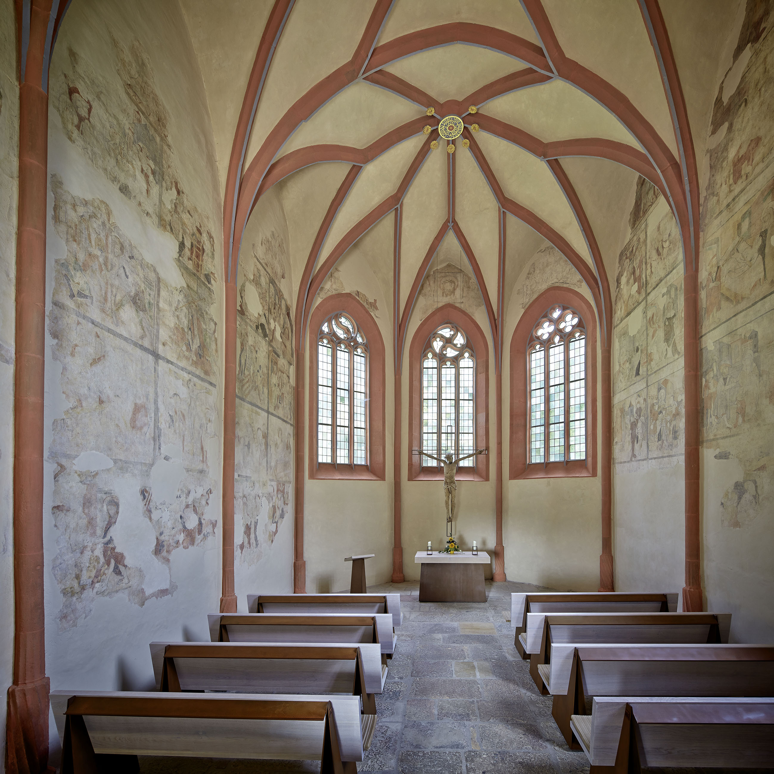 Liboriuskapelle zu Creuzburg mit Conrad Stebels Wandmalereien über das Leben Elisabeths und die ihr zugeschriebenen Wunder.